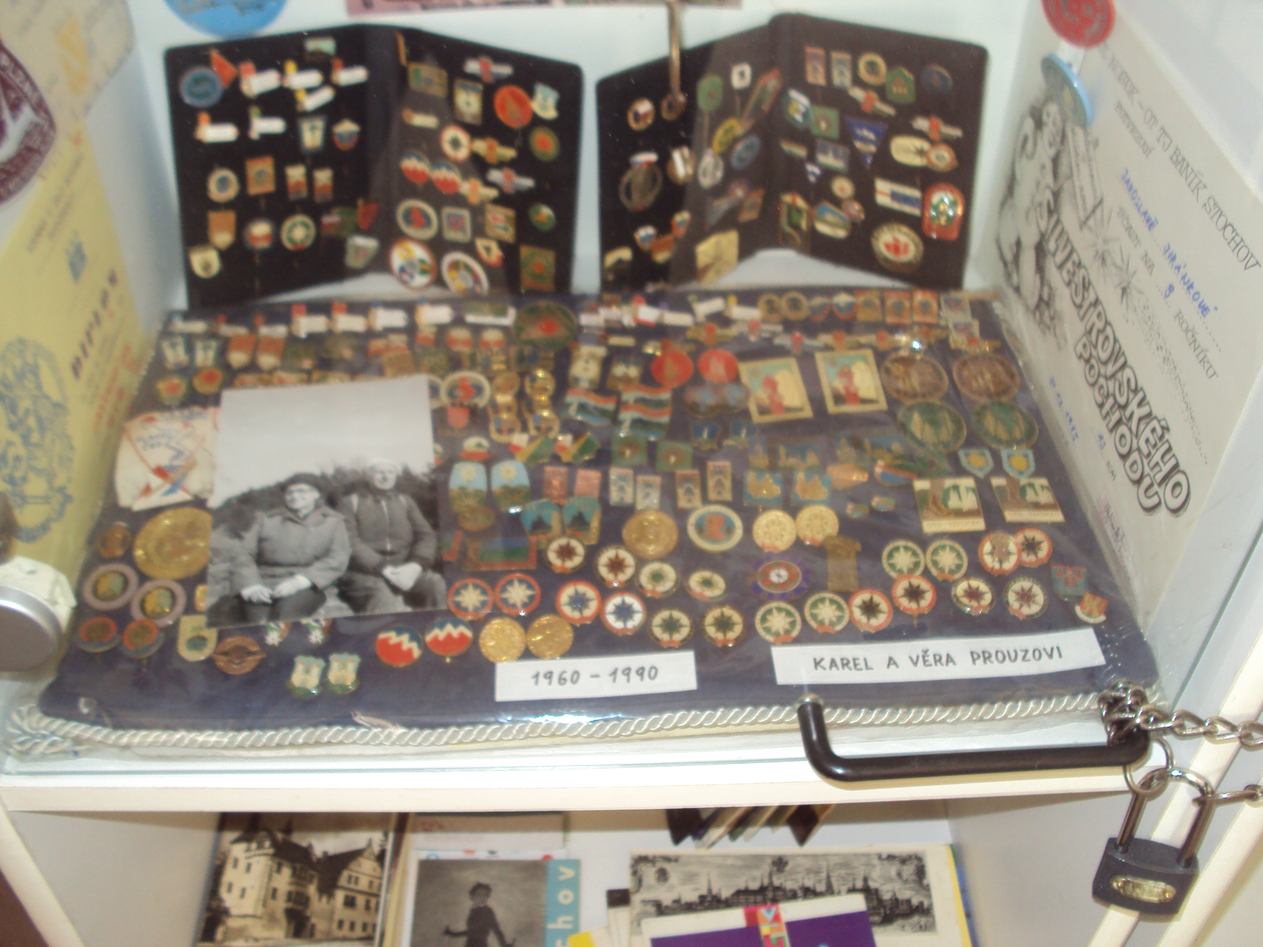 Nekvalitní snímek turistických odznaků na výstavě KČT Česká Lípa